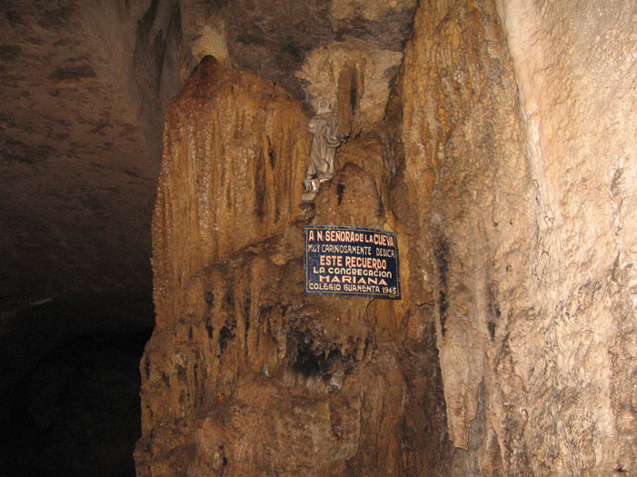 Cueva del Yeso, curiti Santander, salon de la virgen